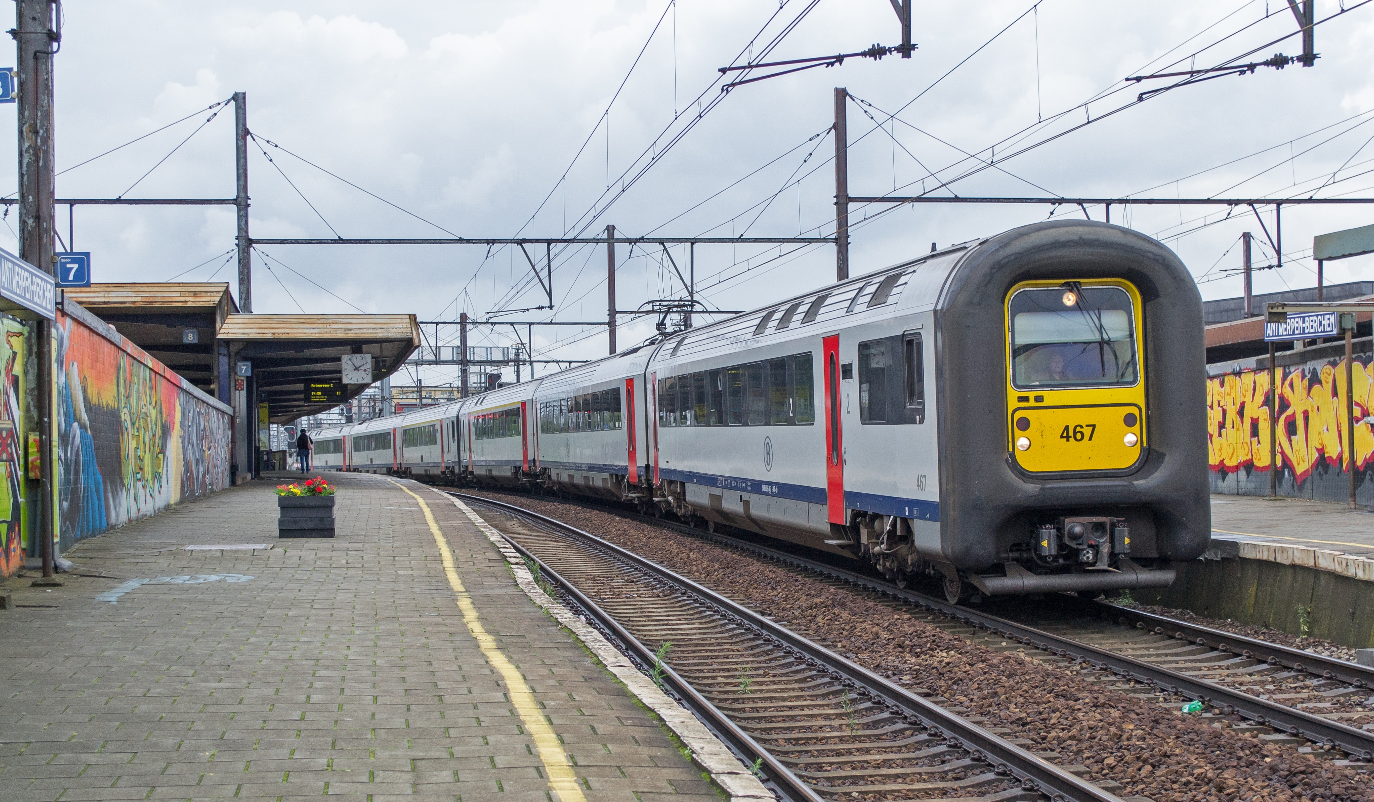 Een aantal opnames uit 2014 die vond uit België. Een desolaat station Antwerpen-Berghem met NMBS 467 als IC 2613 naar Hasselt.